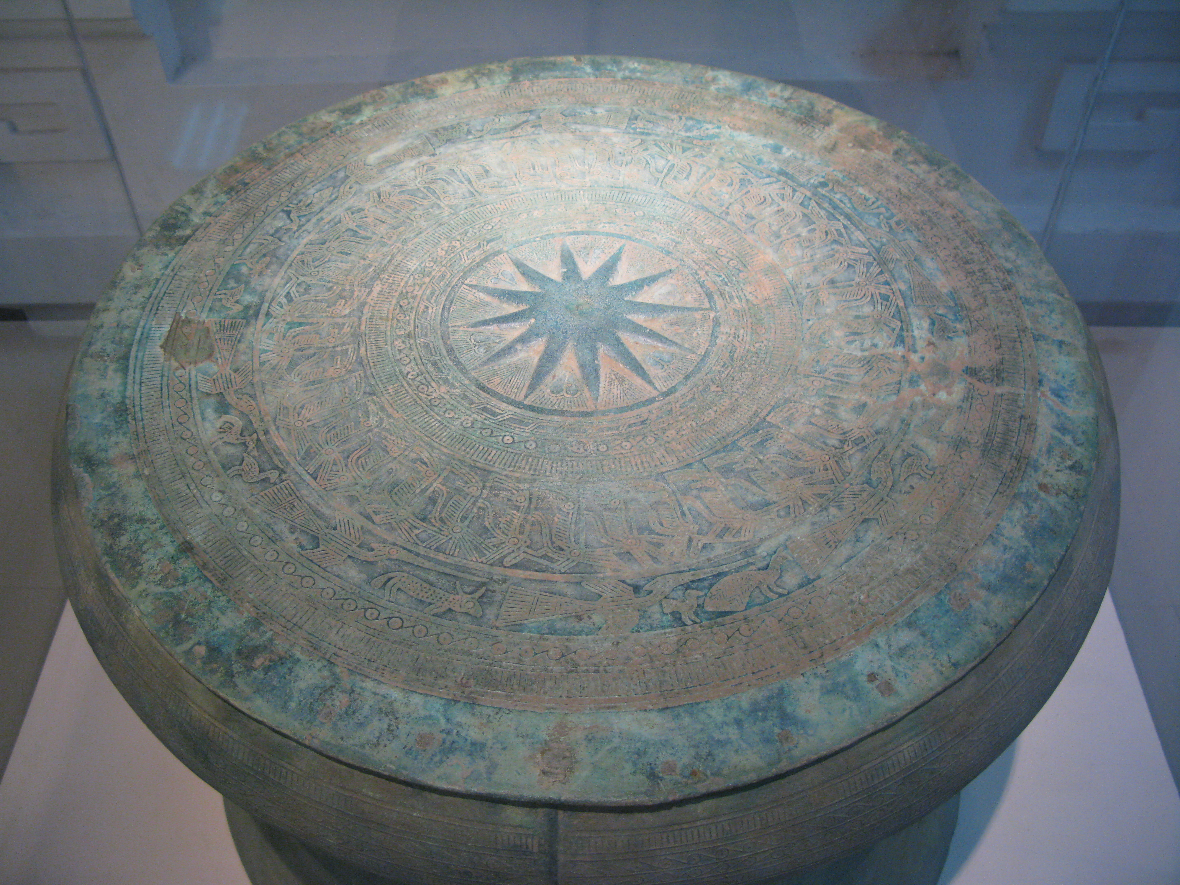 Trống đồng Đông Sơn có niên đại 500-0 năm trước công nguyên. Hiện vật khảo cổ trưng bày tại Bảo tàng Lịch sử Việt Nam.